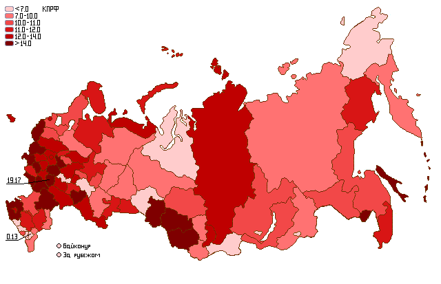 Результаты политической партии КПРФ на парламентских выборах 2007 года (по регионам)